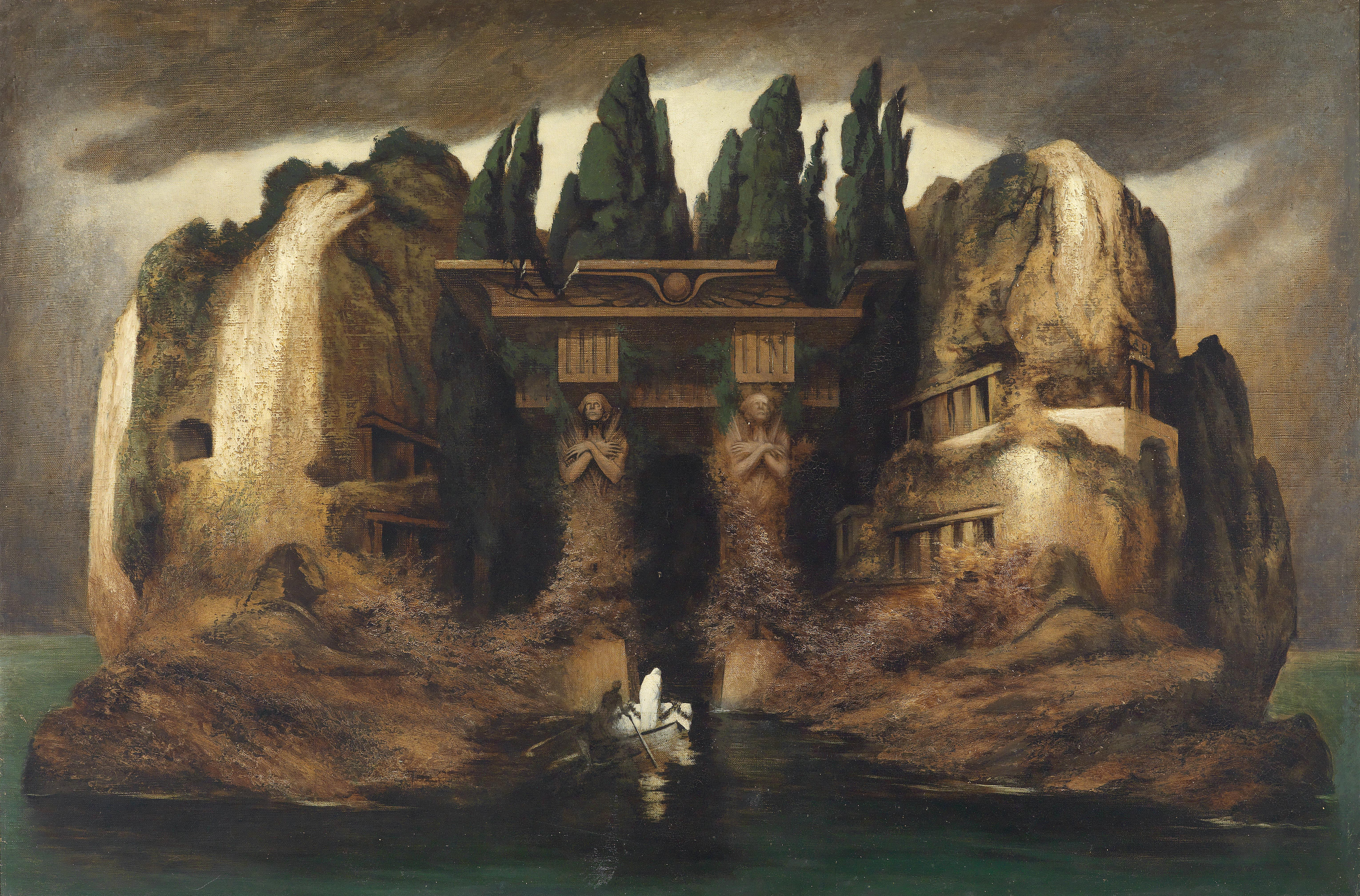 Toteninsel. Hommage Diefenbachs an Arnold Böcklin. Am Gebäude rechts befindet sich als Zeichen dafür das Monogramm AB